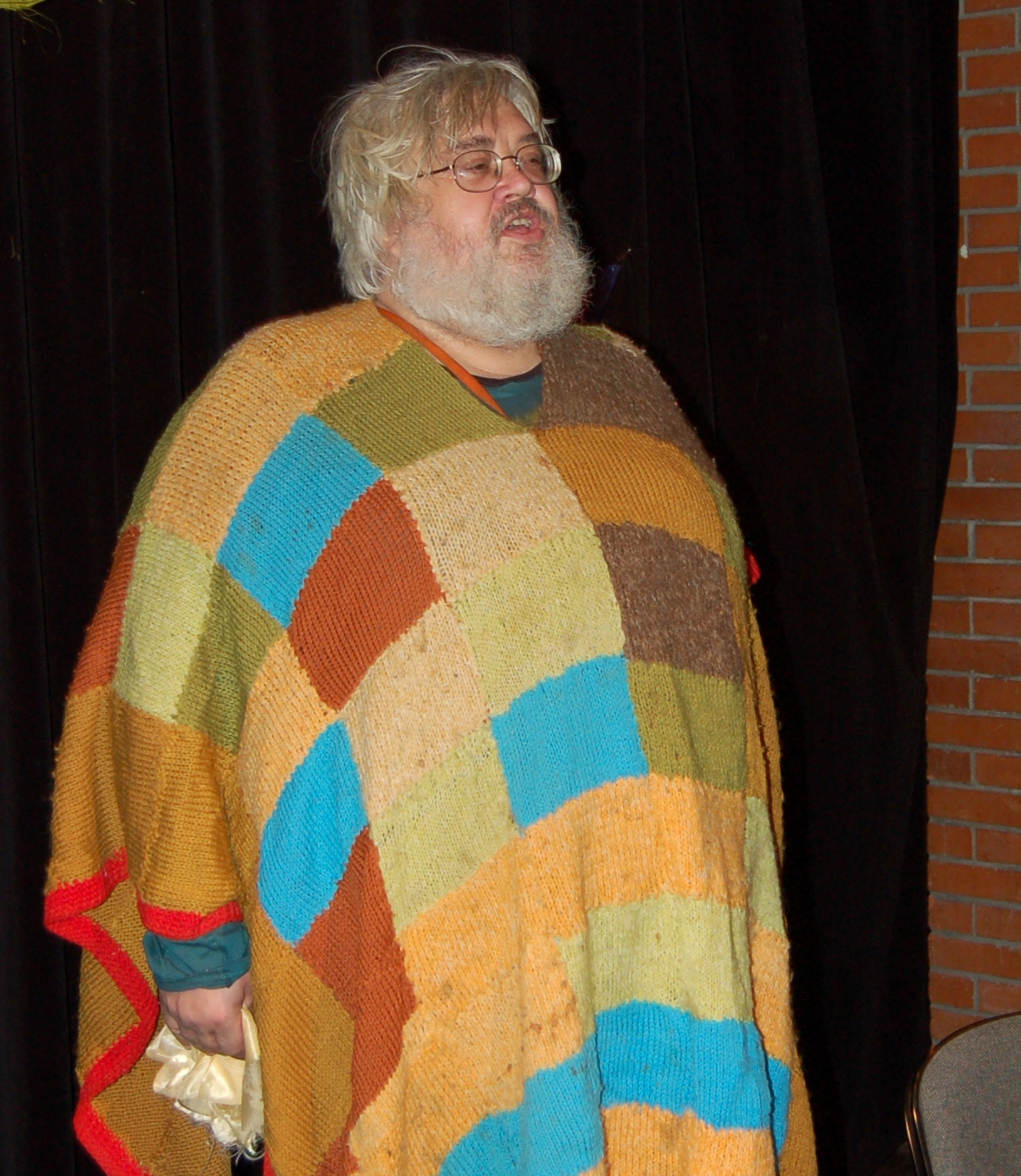 Jiří moravský Brabec jako amatérský herec v divadle Husa na Provázku, v divadelním představení souboru Verdis Yetty a Mauglí (autor Mojmír Vlašín). Jiří Brabec hrál postavu Yettyho. Světová premiéra 8. února 2009.